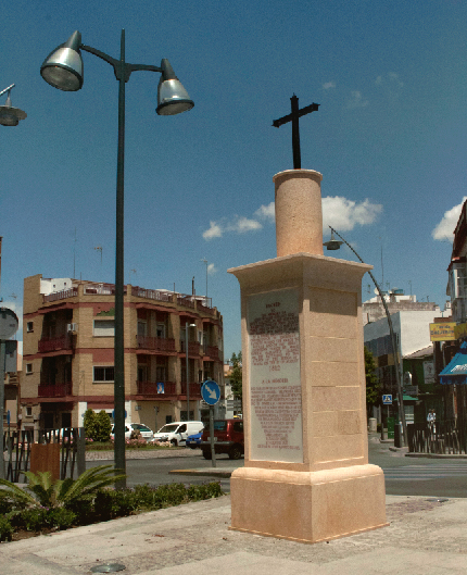 Monolito de la Cruz del Inglés, en Alcalá de Guadaíra (Sevilla).